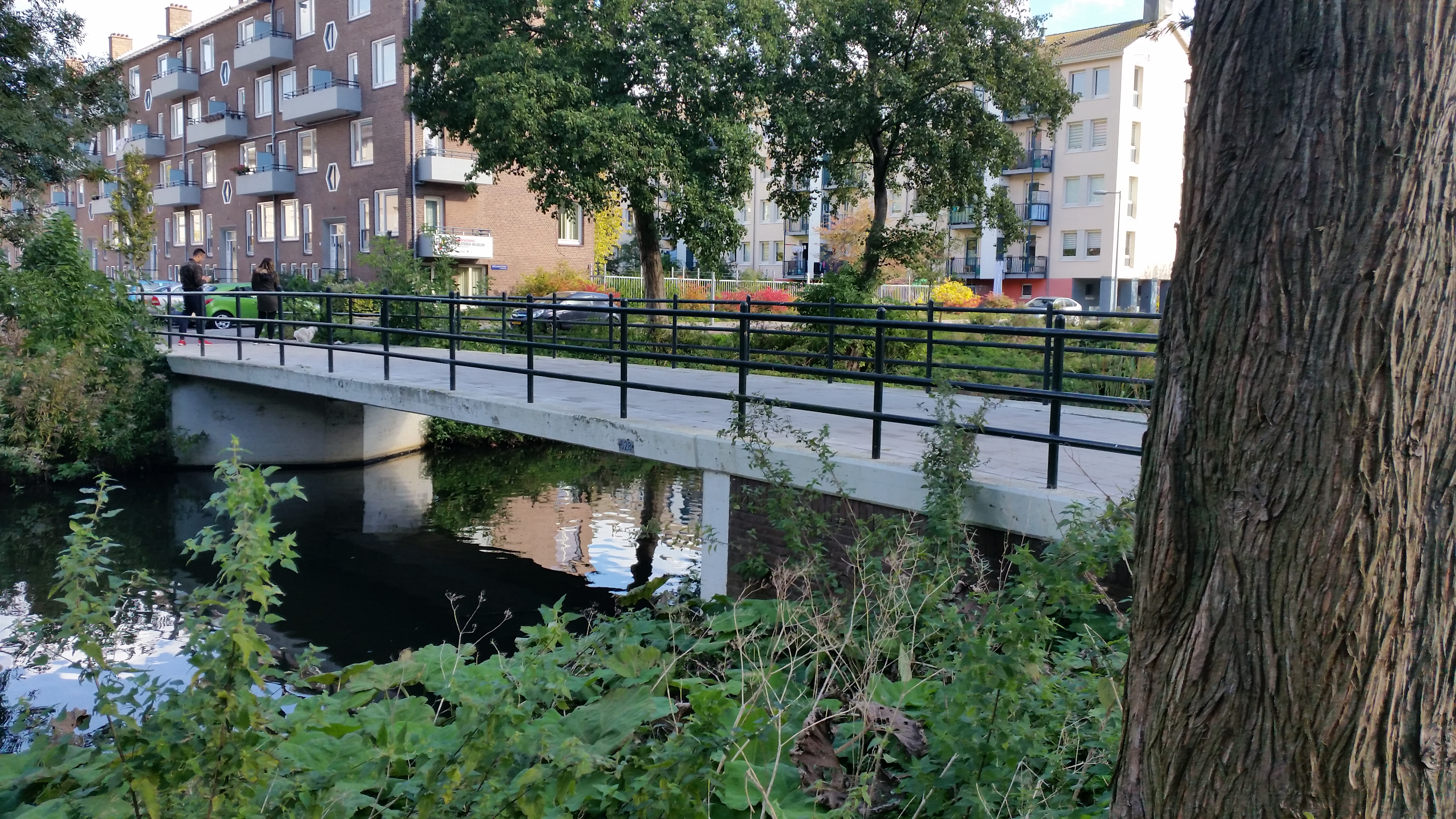 Zijaanzicht van Brug 628, Hester van Lennepbrug